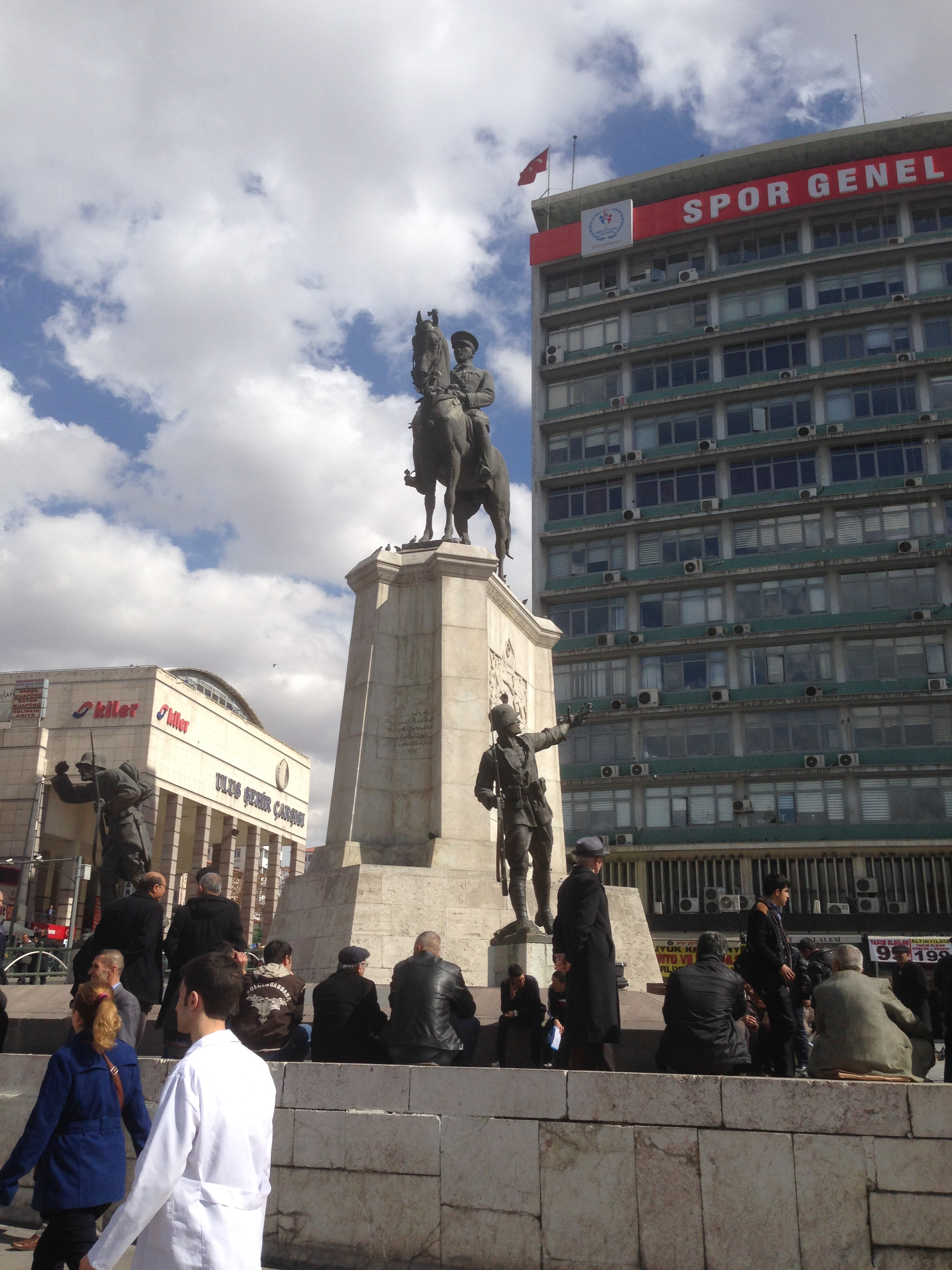 Ankara Ulus'tan bir görüntü.